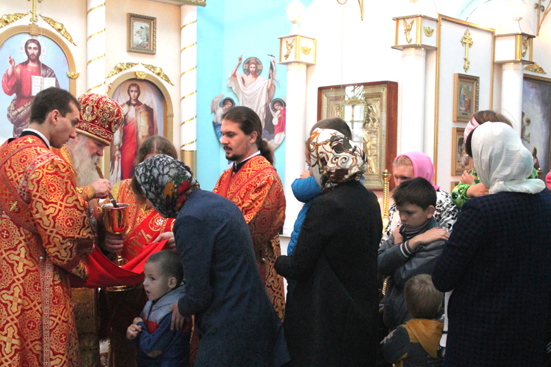 2 октября 2016 года, в неделю 15-ю по Пятидесятнице, по Воздвижении, мчч. Трофима, Савватия и Доримедонта, Высокопреосвященнейший митрополит Липецкий и Задонский Никон возглавил Божественную литургию во Введенском храме села Елецкая Лозовка Хлевенского района.